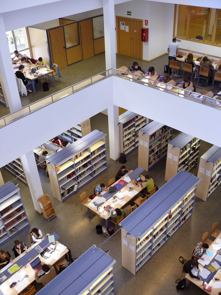 Biblioteca de Humanidades María Moliner (Universidad de Zaragoza)